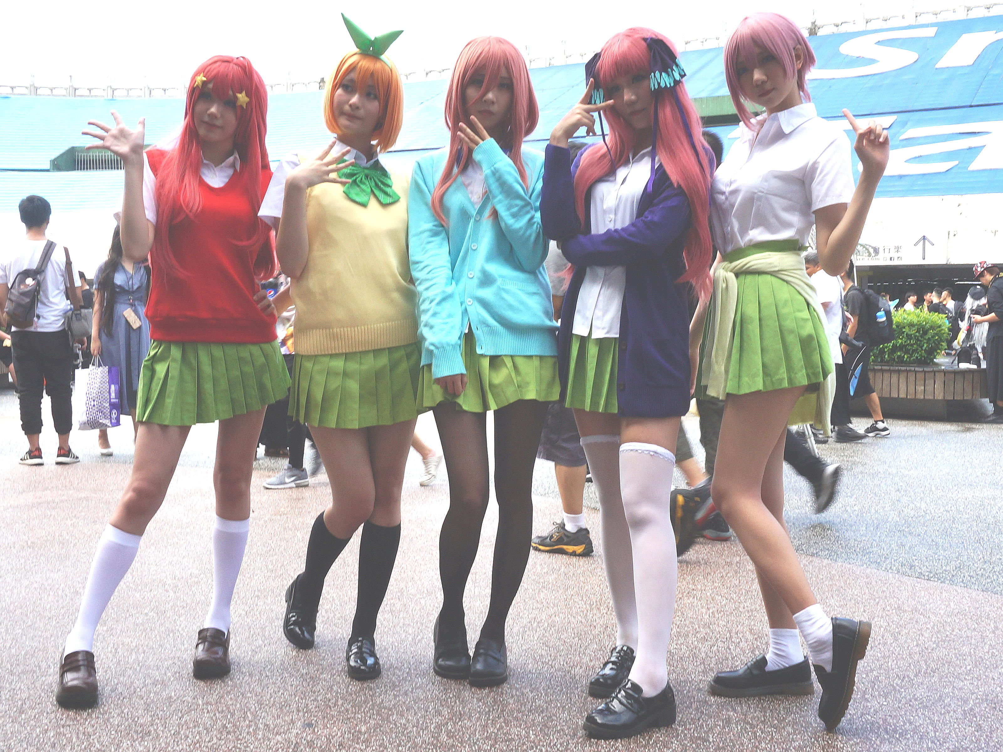 第34屆開拓動漫祭，《五等分的新娘》中野五月（左一）、中野四葉（左二）、中野三玖（中）、中野二乃（右二）、中野一花（右一）cosplayer。